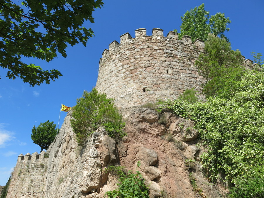 Castell de Berga, Bergadà - Catalunya